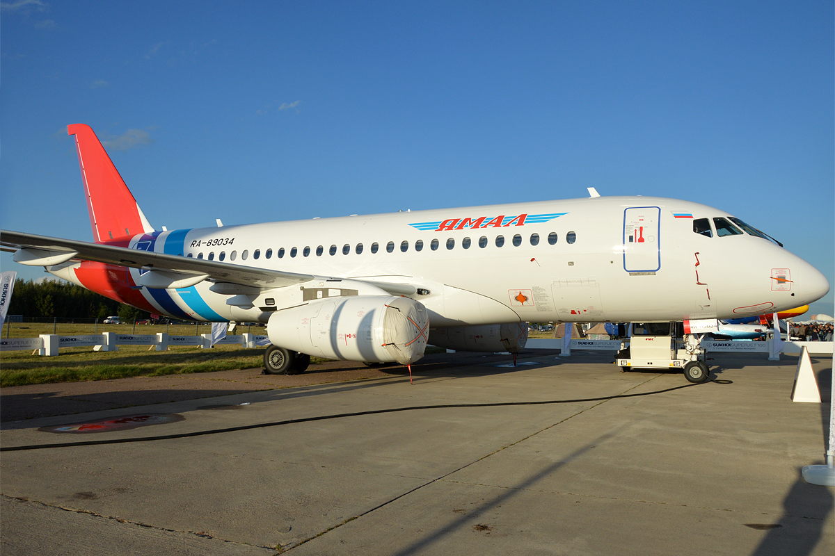 Yamal Airlines, RA-89034, Sukhoi SuperJet 100-95LR